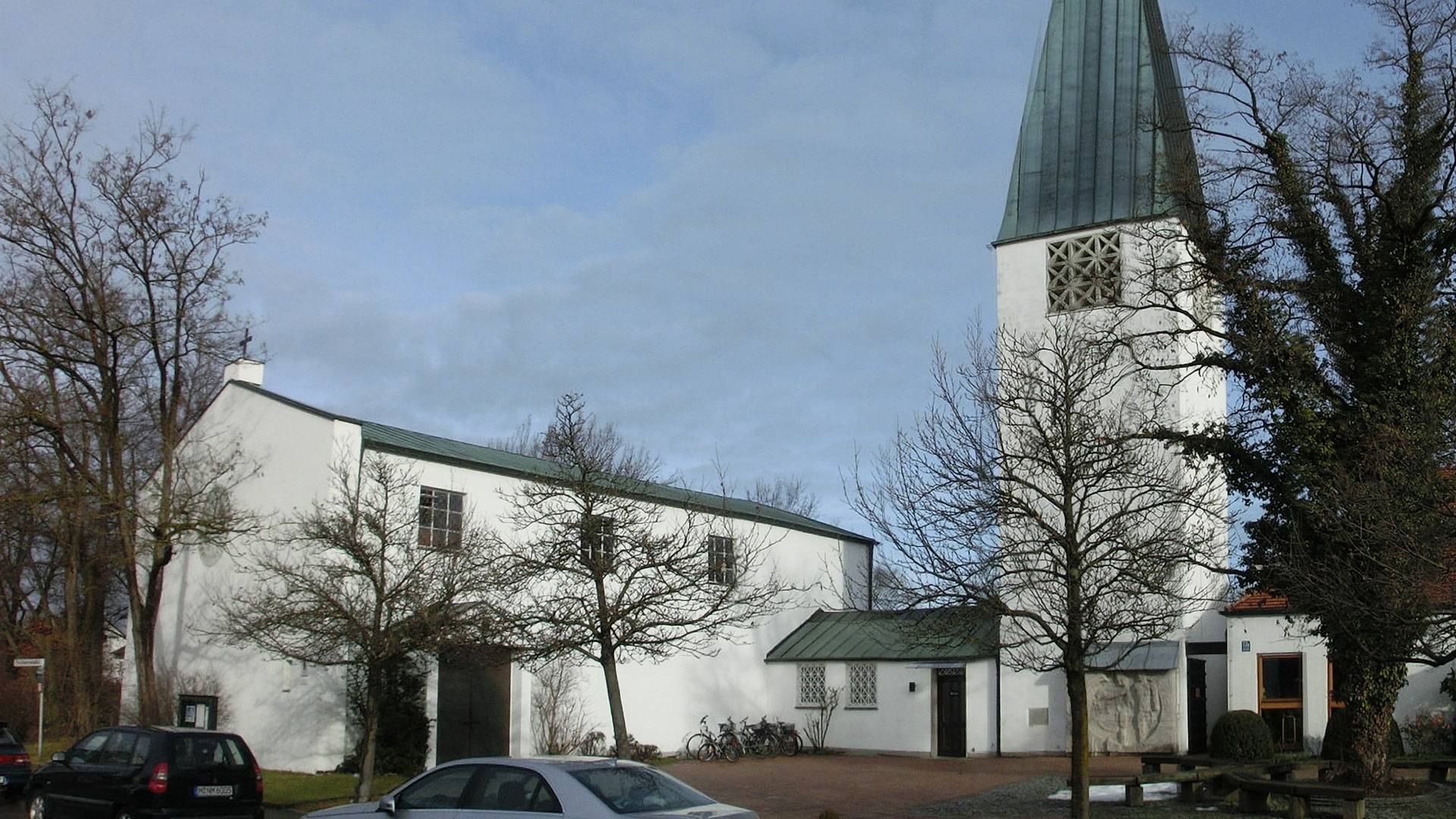 Genezareth-Kirche in Unterschleißheim im Dezember 2012